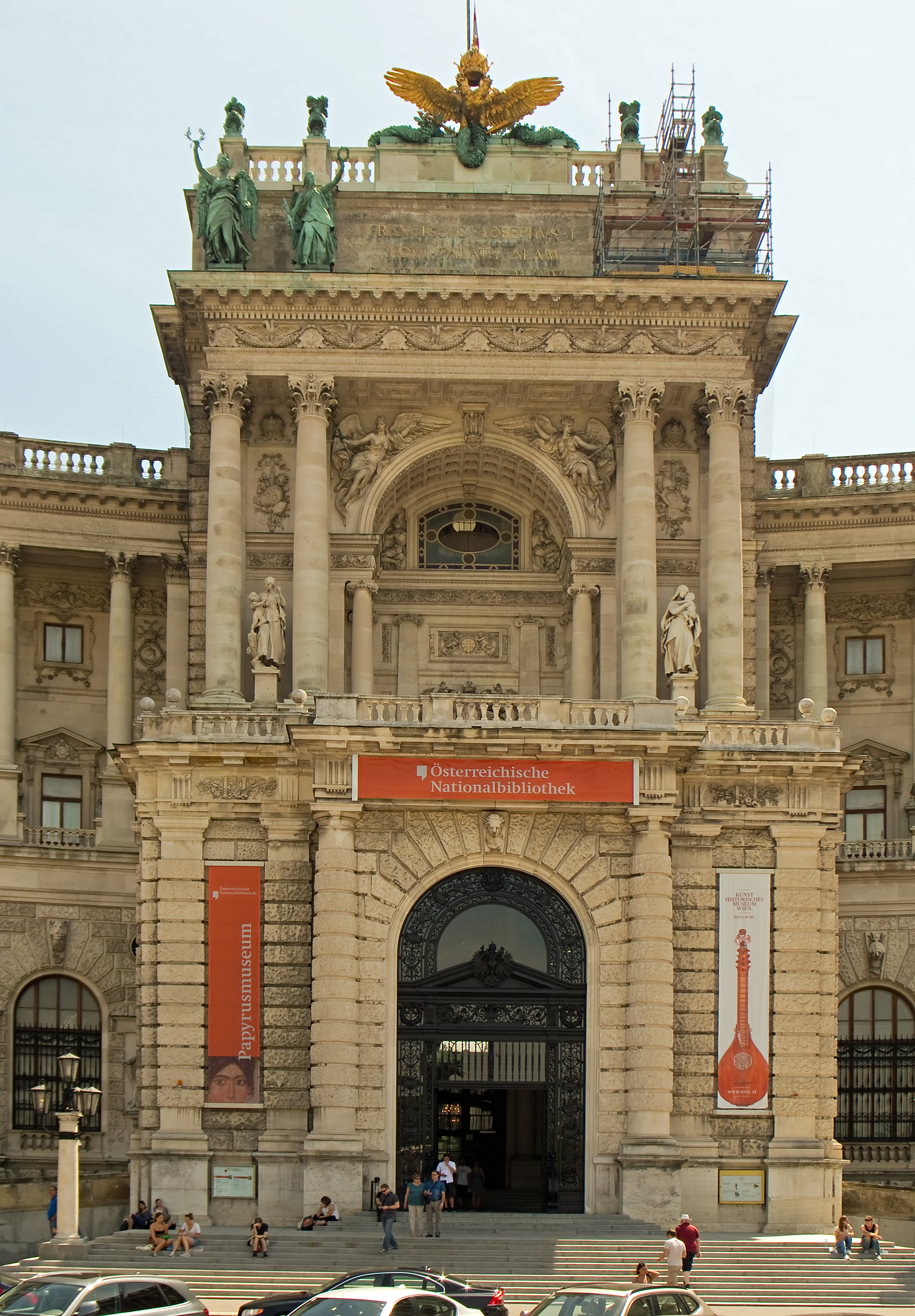 Hofburg (Neue Burg), die im das Haus der Geschichte Österreich (HGÖ) beherbergen wird: Zentraler Eingangsbereich mit der Terrasse ("Hitler-Balkon") vor der musealen Adaptierung.